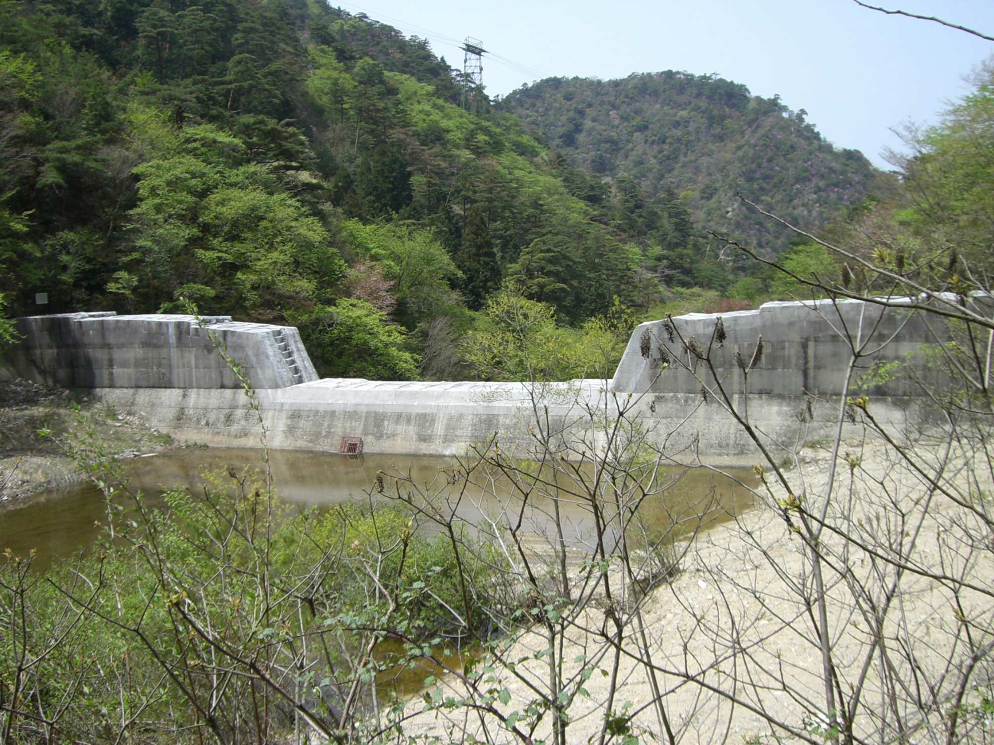 Sand guard dam 六甲山中にあるja:砂防ダム